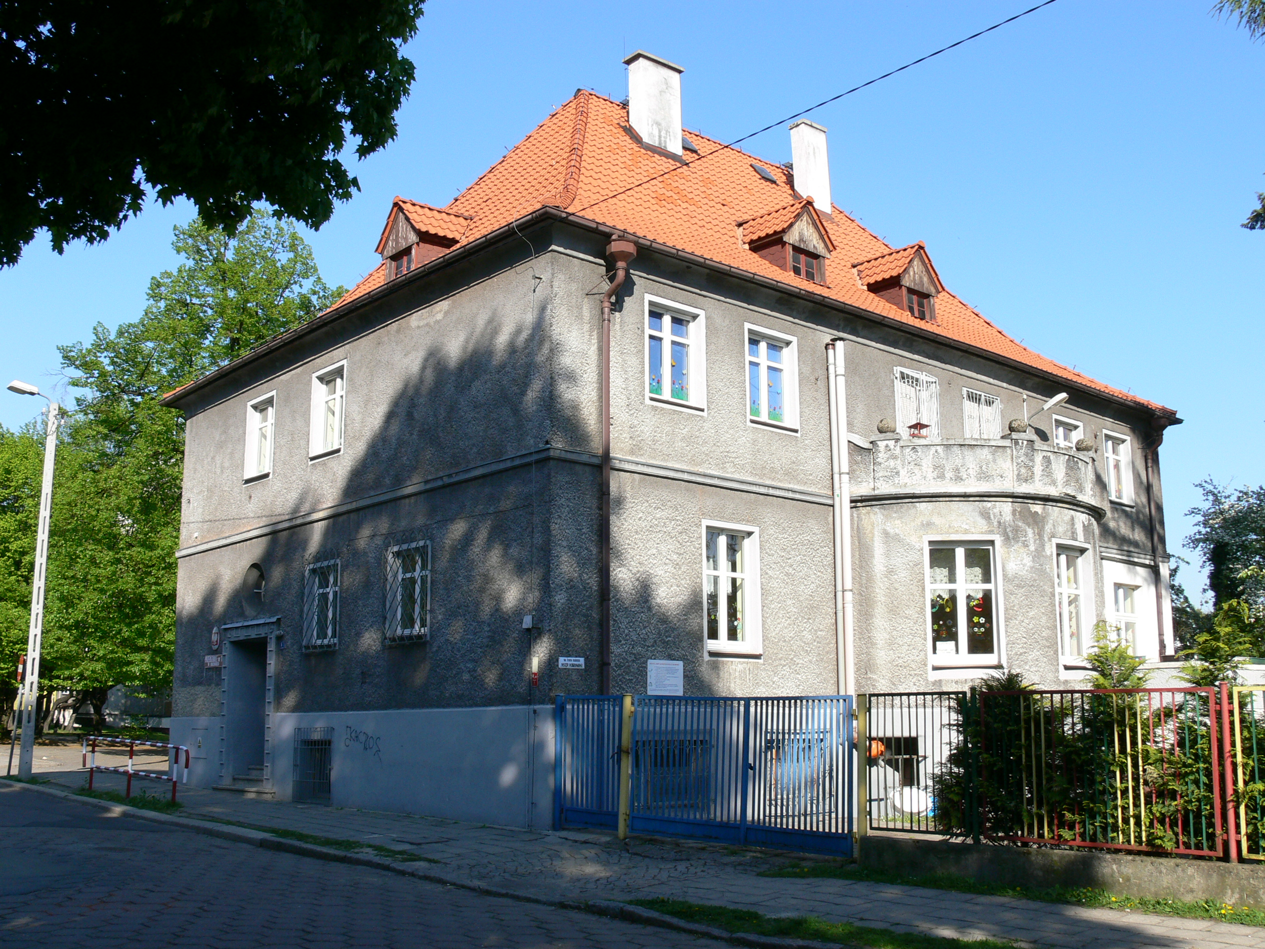 Racibórz - ul. Bema: Przedszkole nr 12